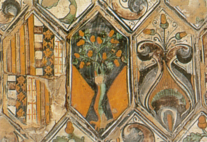 Ceramica di deruta, piastrelle della cappella basso della rovere